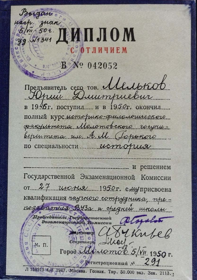 Диплом о высшем образовании Мелькова Ю. Д.